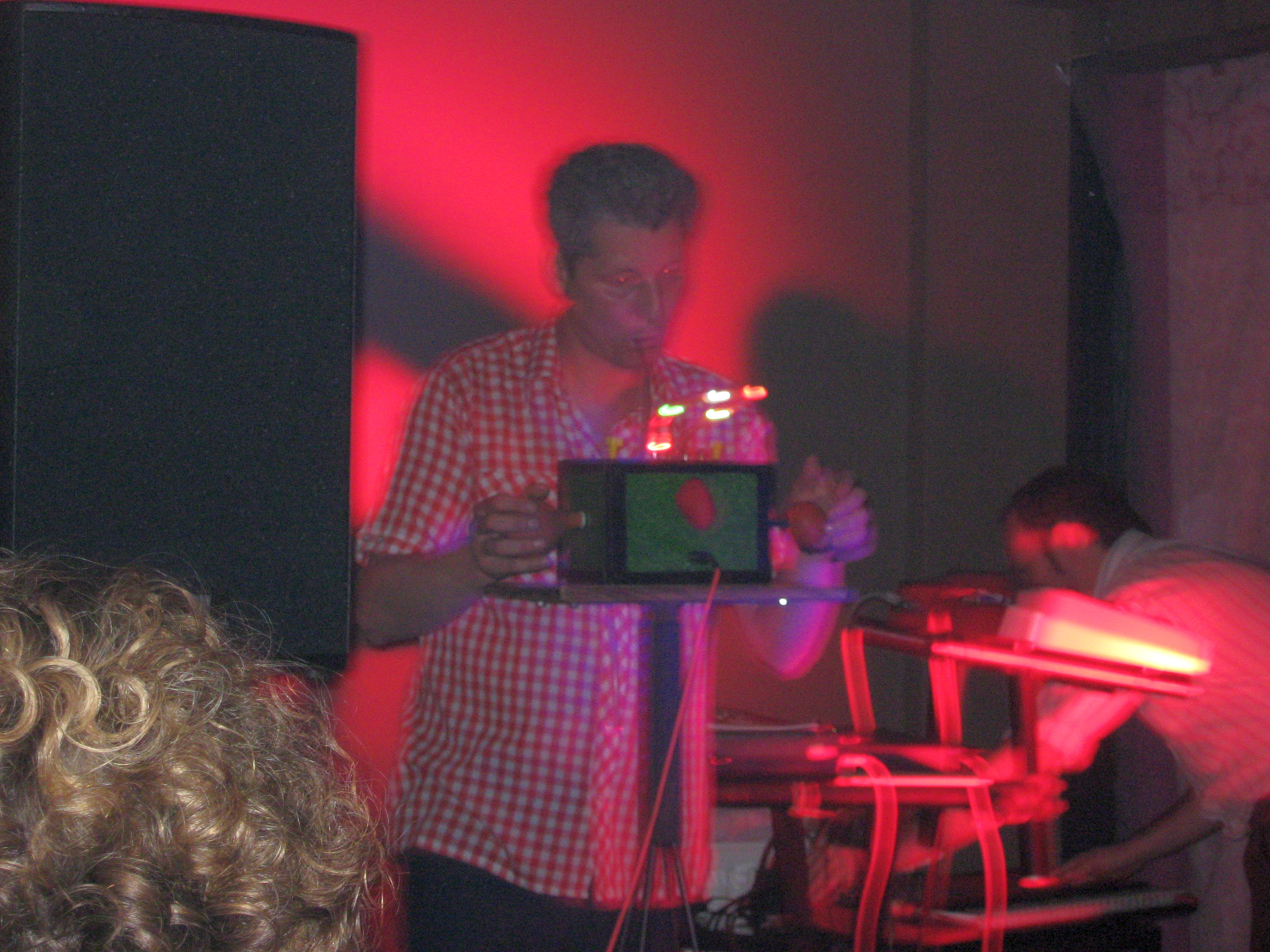 Holosud live im August 2009 in Köln